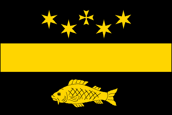 Vlajka, Strunkovice nad Volyňkou, okres Strakonice